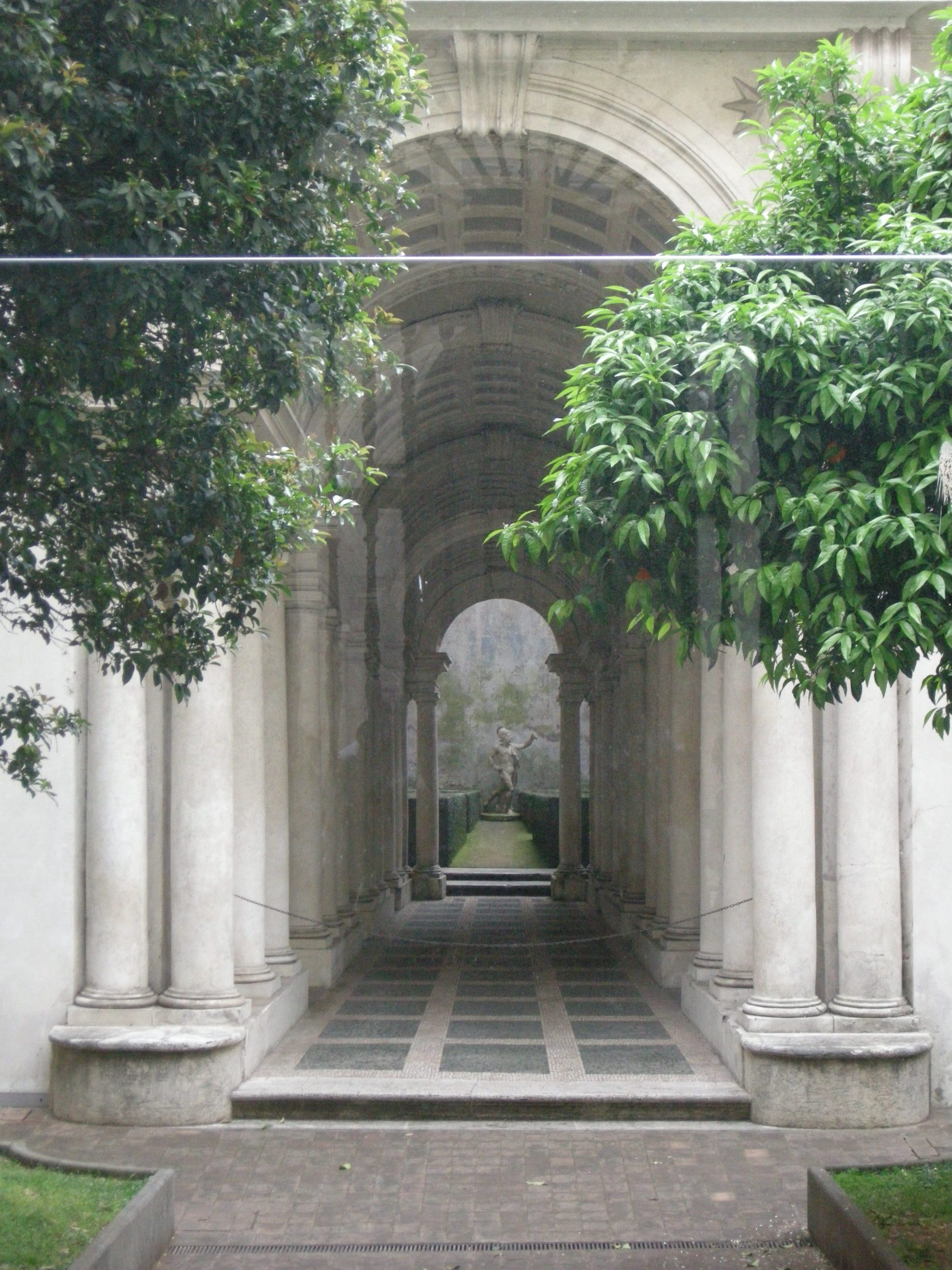 Palazzo spada, galleria